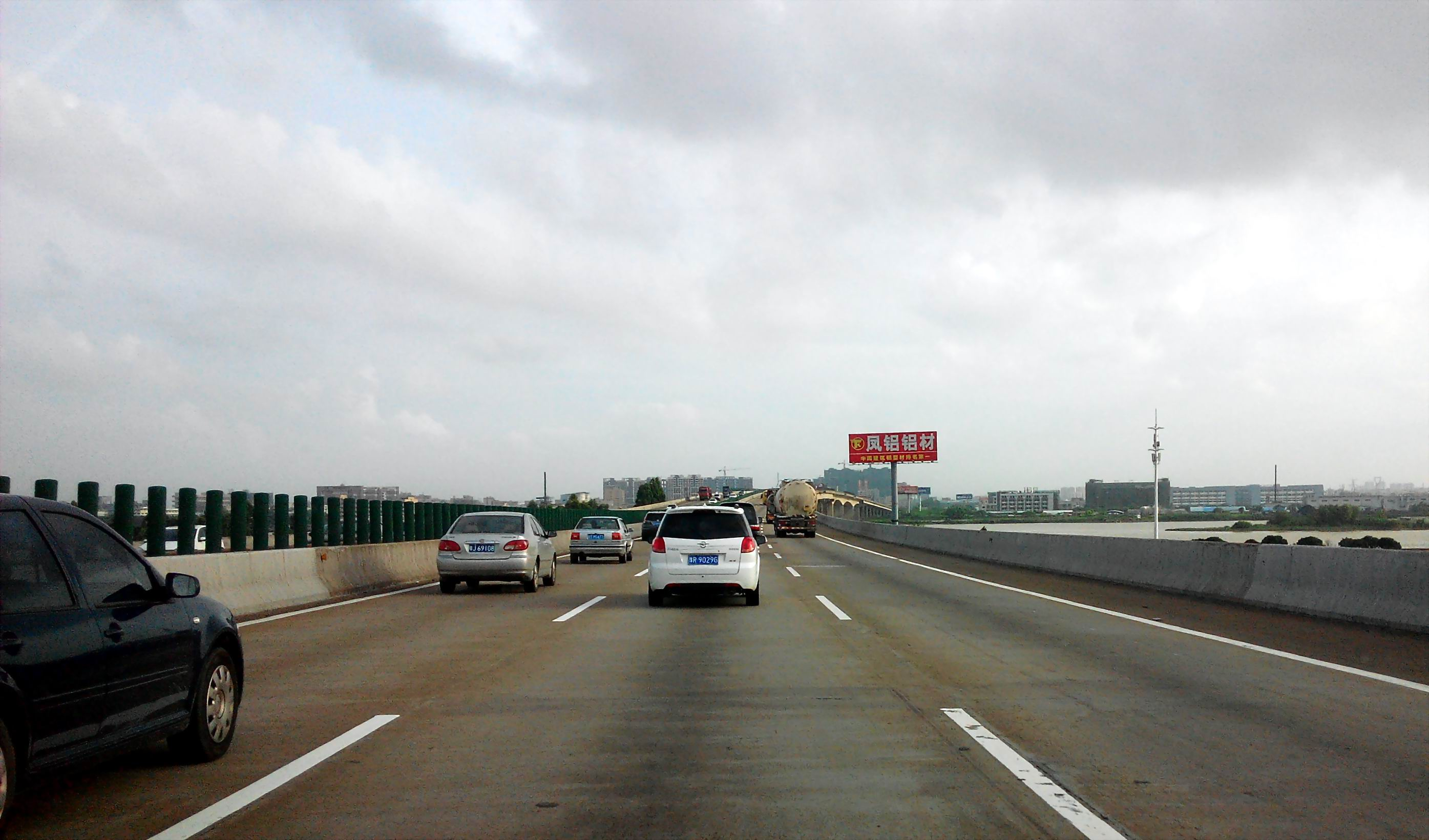 中国高速G4W 澳门方向 横沥桥 广州及中山交界